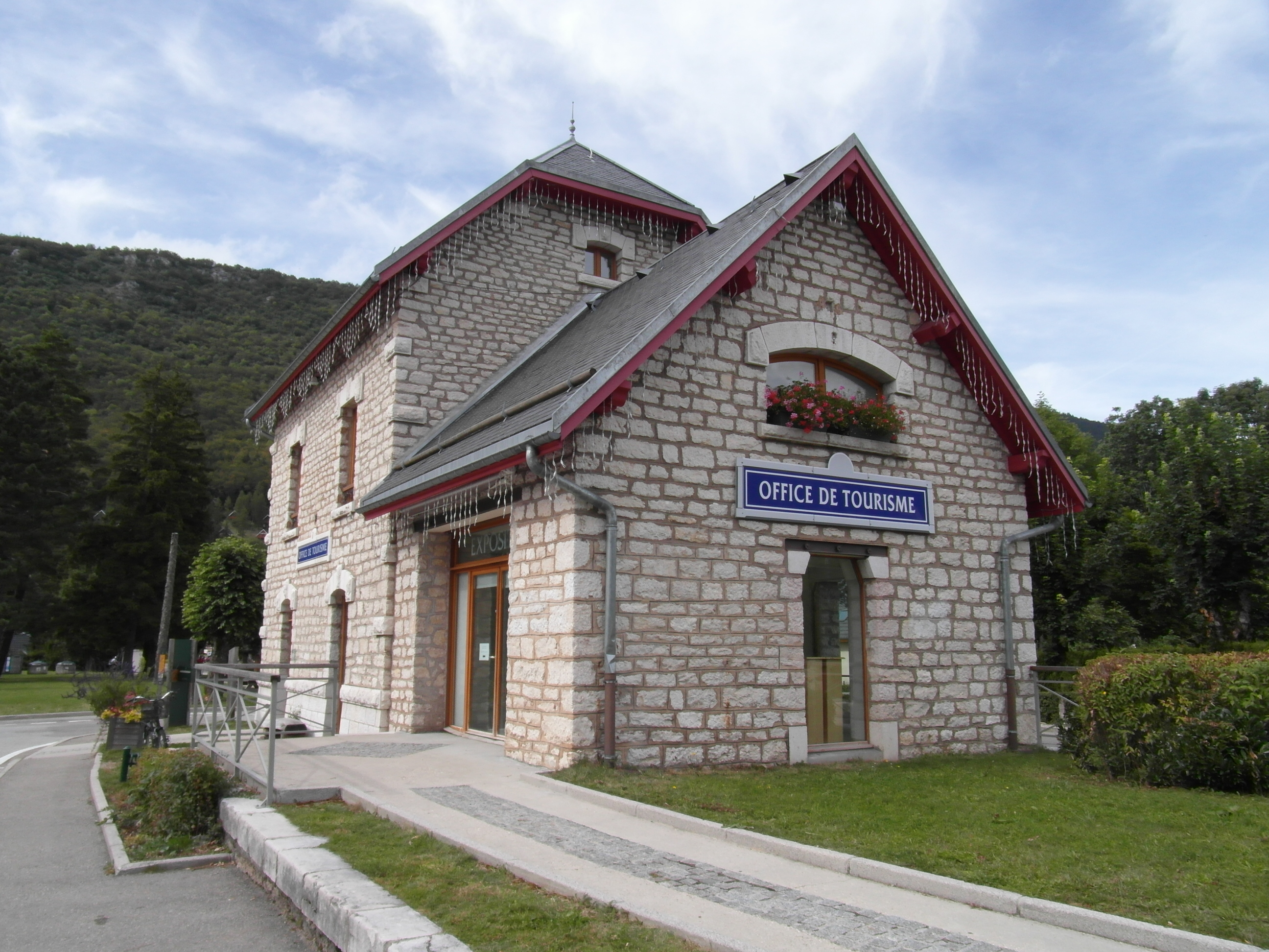 OT de Lans